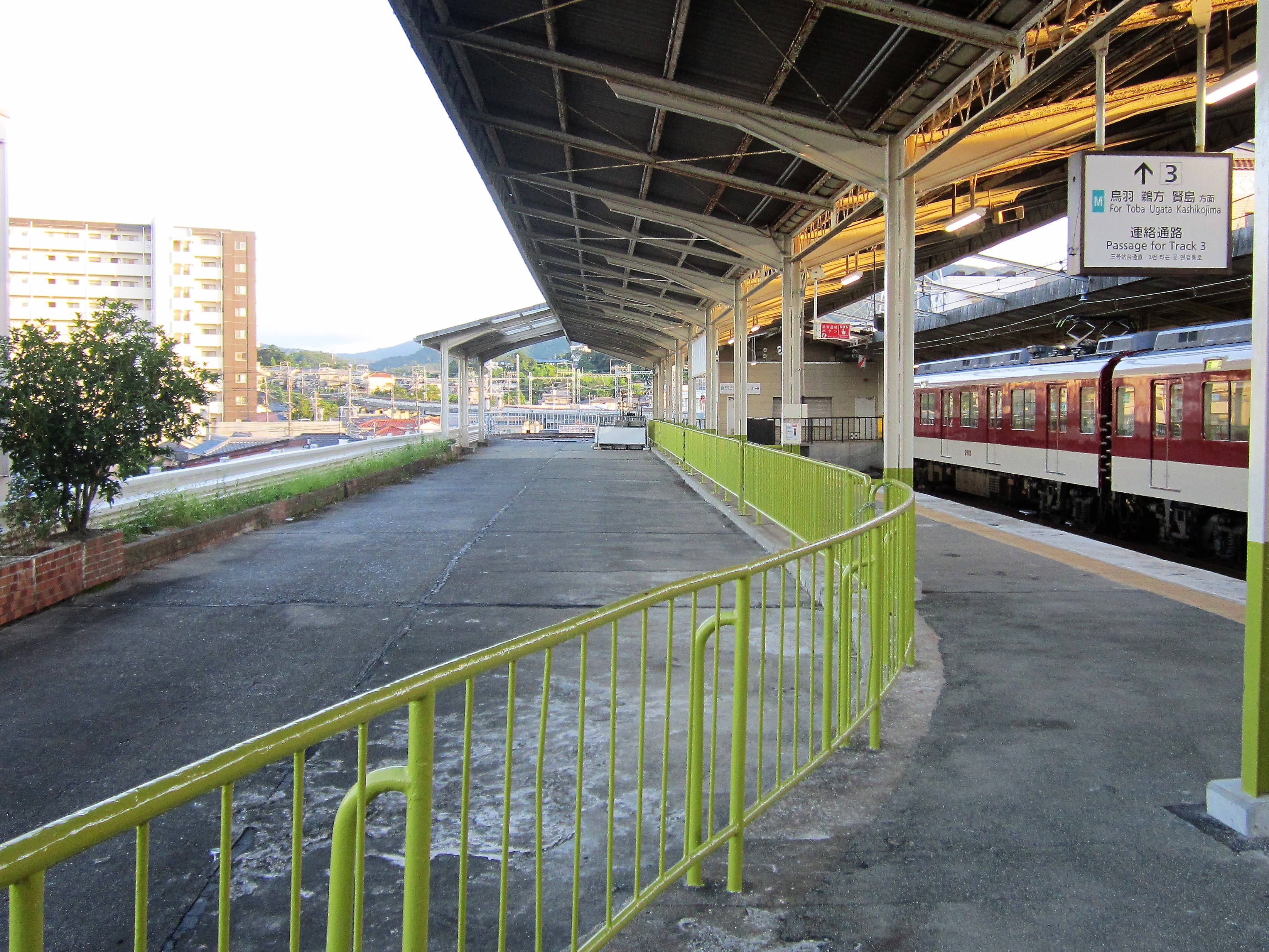 宇治山田駅のホームに直結するバス乗り場跡